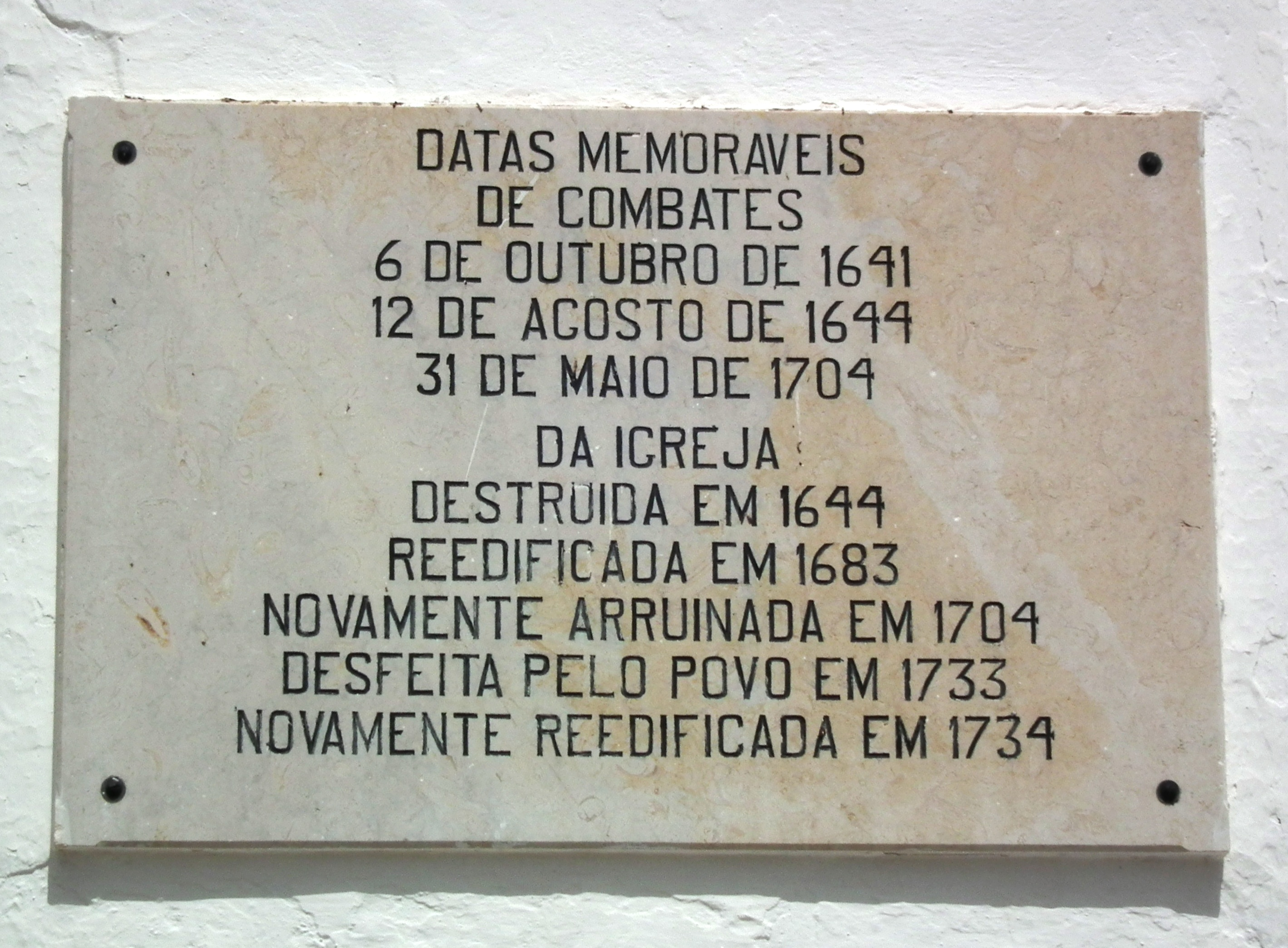 Tabuleta com inscrições indicativas dos combates travados em Santo Aleixo da Restauração e da edificações da igreja matriz